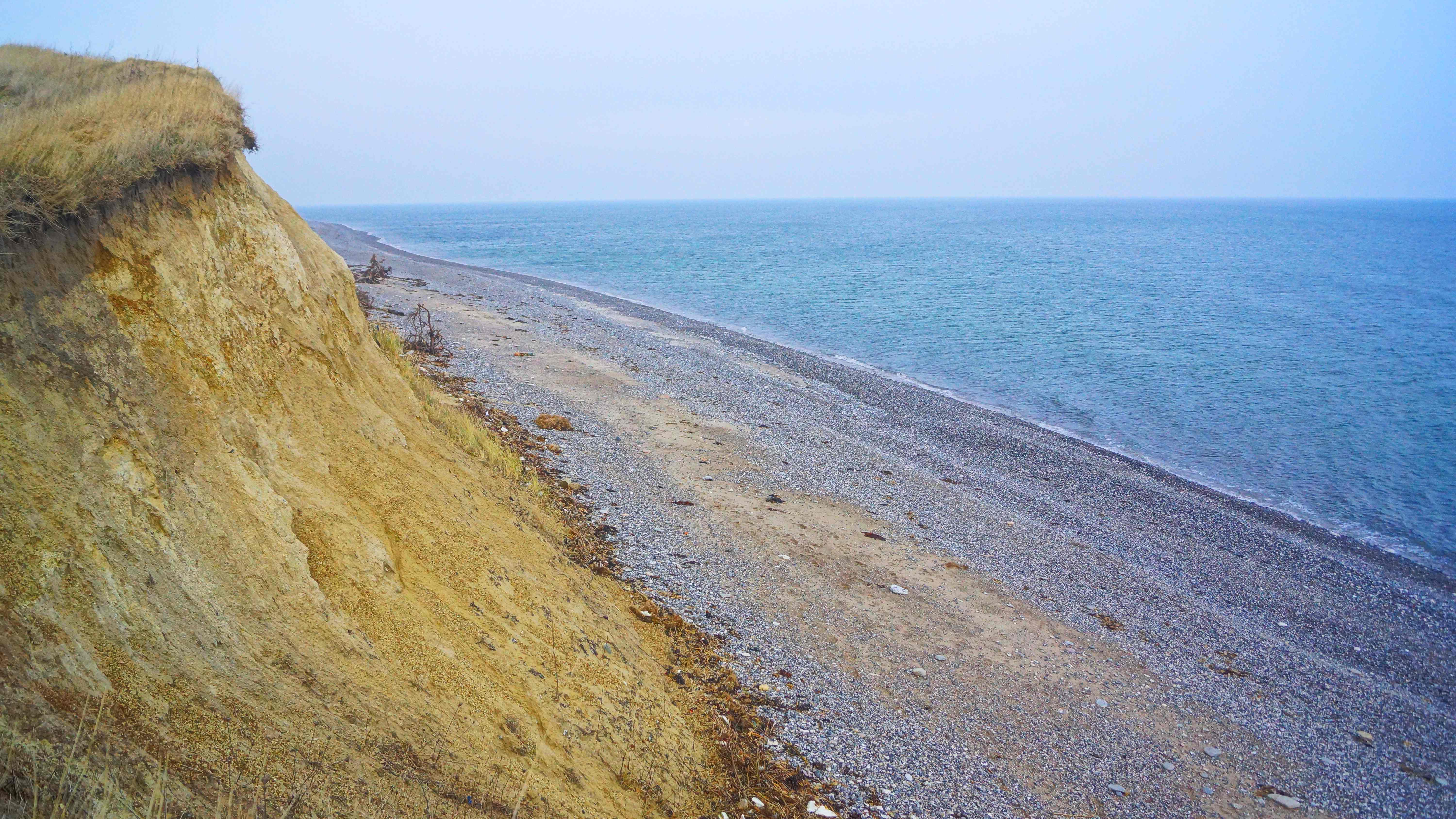 Gjerrild Klint, udsigt mod nord.